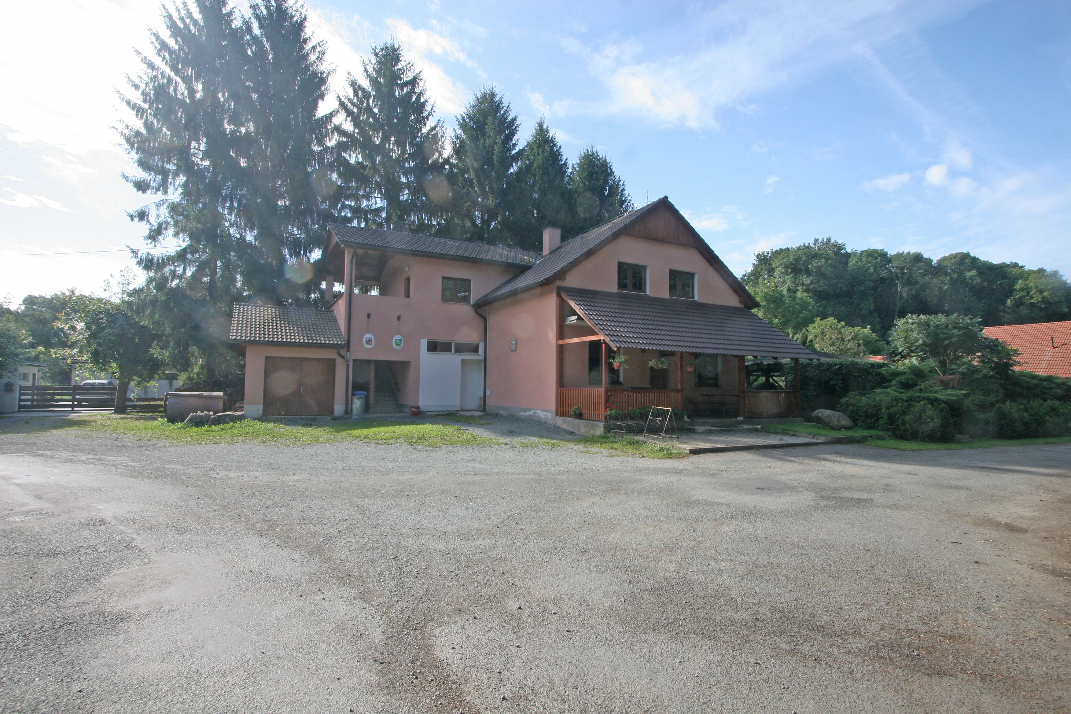 Chrtníky obecní úřad